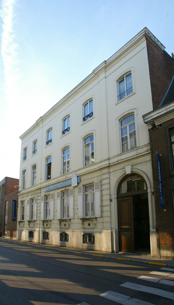 Leuven Minderbroedersstraat 13